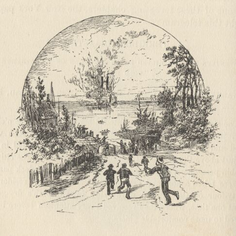 Le steamer Gold Dust explose le jour même où mark Twain devait se trouver à bord.